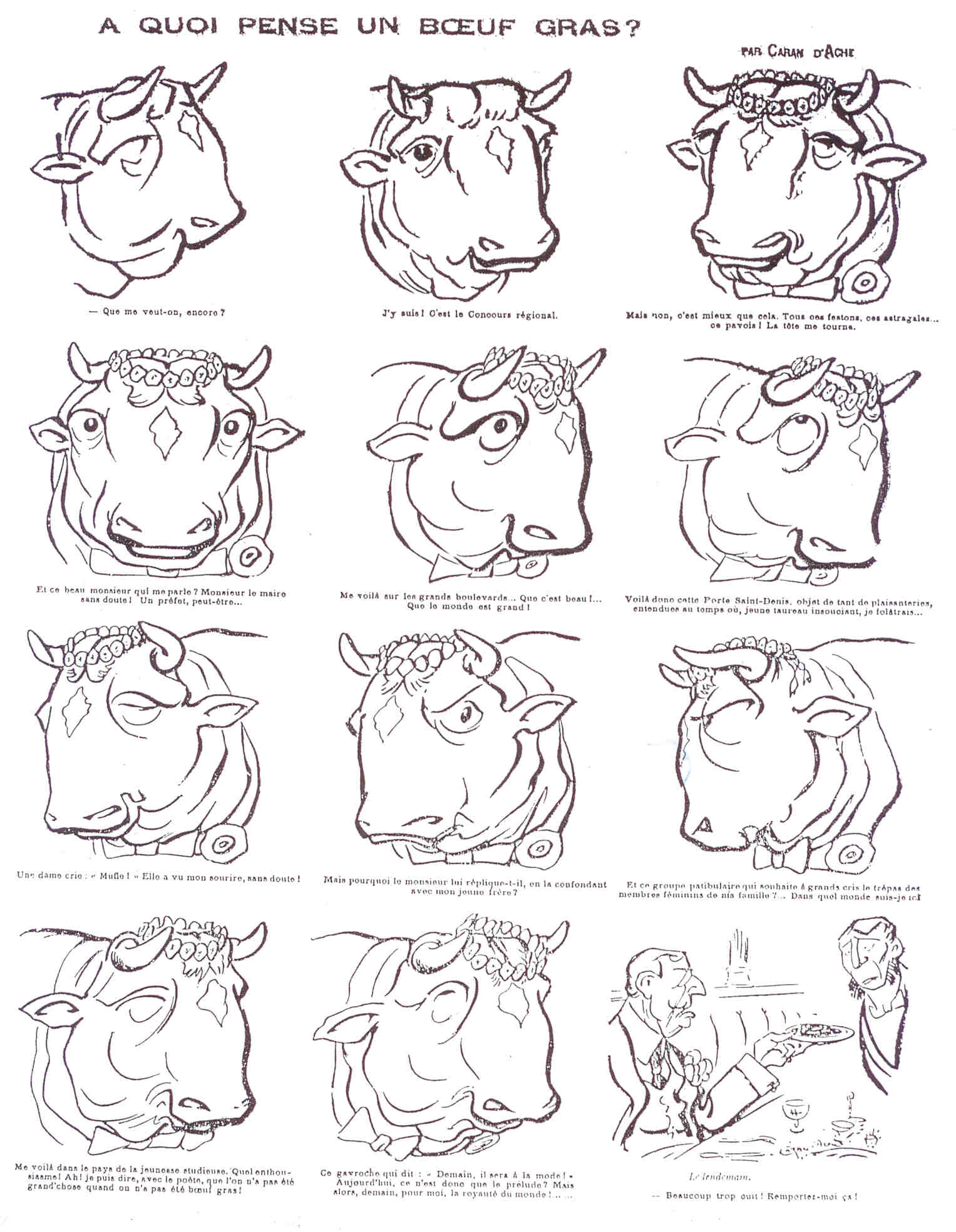 Série de caricatures à propos de la Promenade du Bœuf Gras, traditionnel cortège carnavalesque parisien.